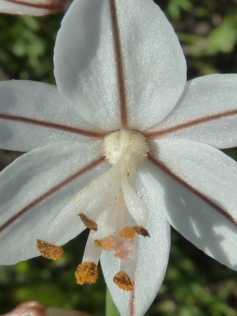 Asphodelus fistulosus (Gamoncillo): Flor, detalle - Camino de la Azarbe de Patricio, Albatera (Alicante, España).